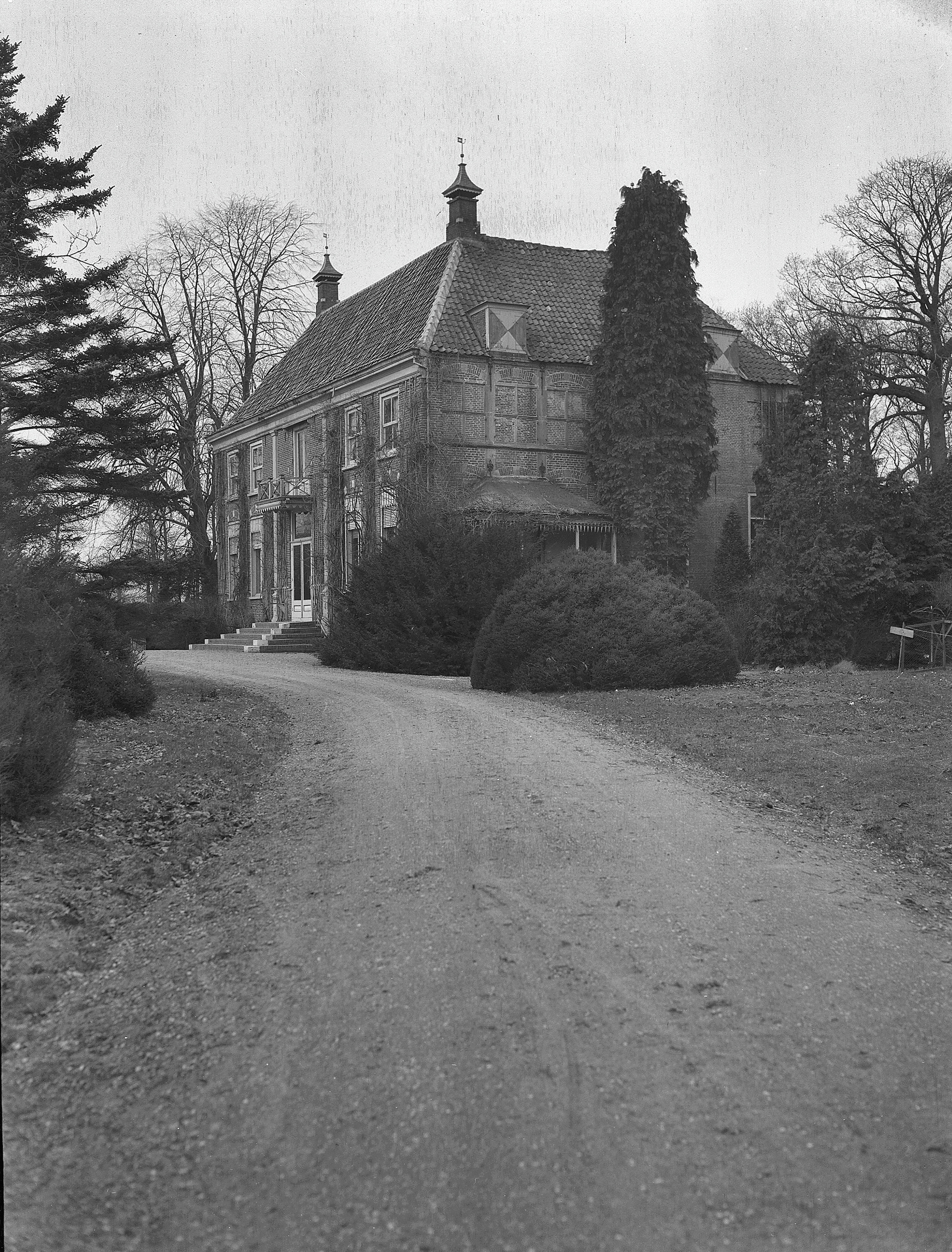 Huis Wittenstein: exterieur